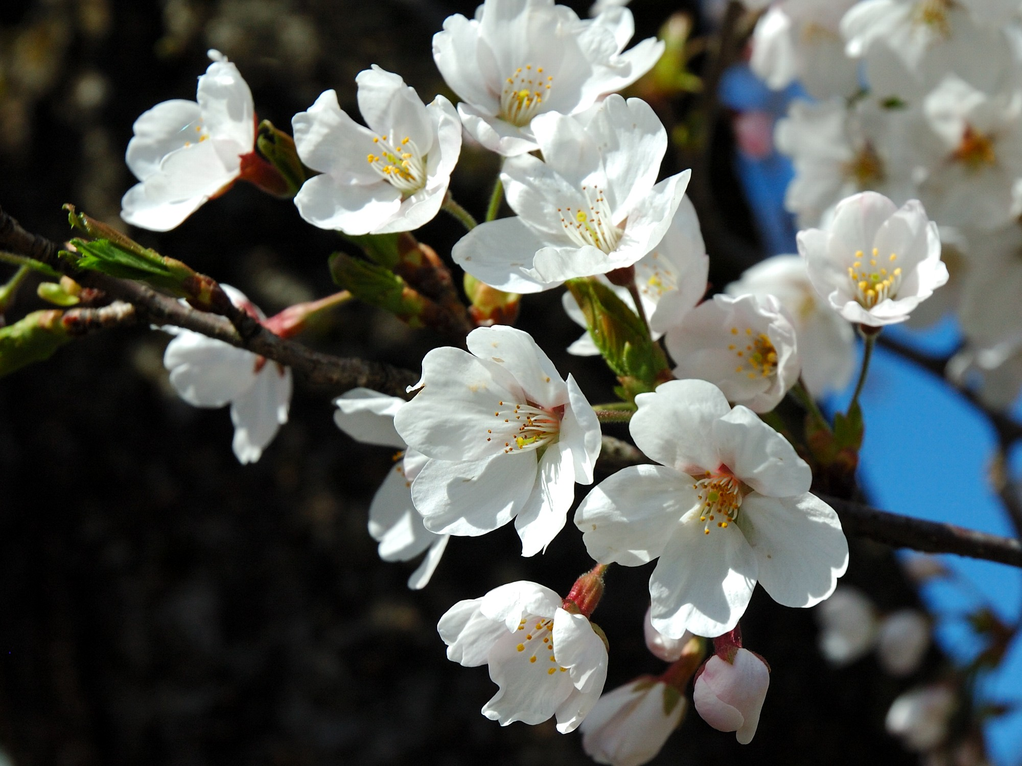 Prunus serrulata (サクラ)